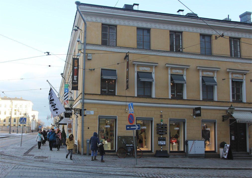 Lumi-asustemyymälä Helsingin Unionin- ja Aleksanterinkatujen kulmassa. Sanna Kantolan ja Bruno Beaugrandin yhteisen Lumi-yrityksen tunnetuimpia tuotteita ovat laukut. Yritys sai syksyllä 2011 muotialan Kultainen vaatepuu -palkinnon.